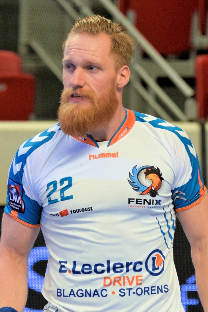 Miha Žvižej, le 19 novembre 2014, lors du match PSG Handball / Toulouse à Coubertin (Paris).